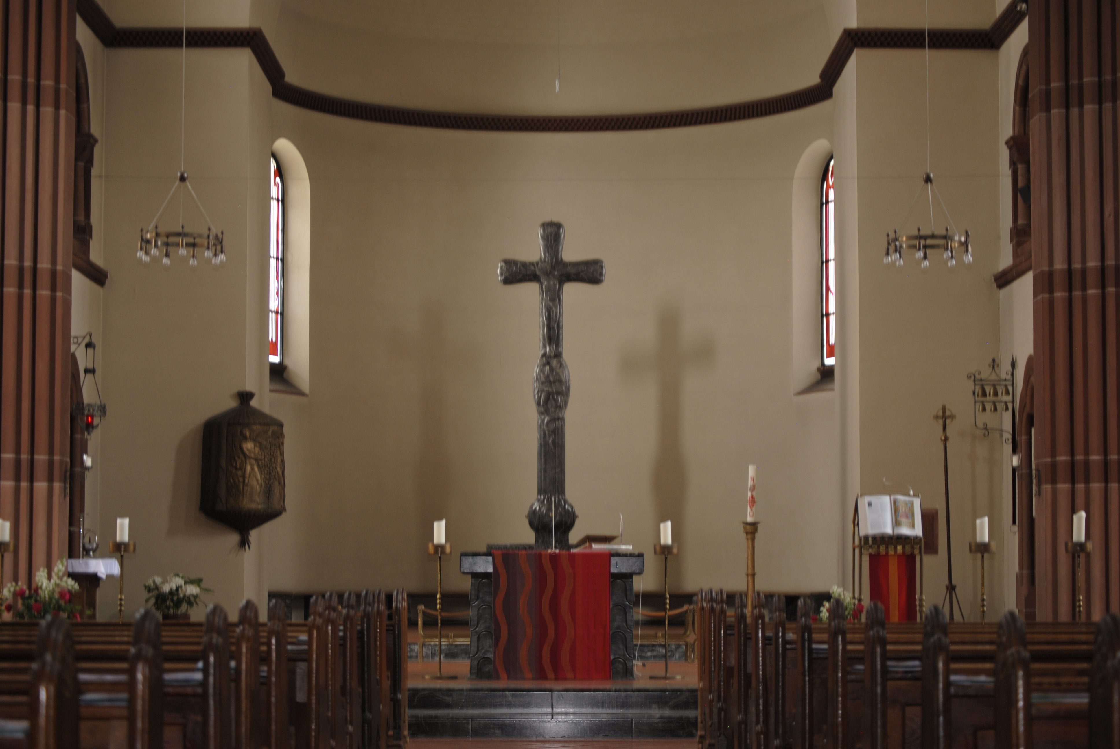 Innenraum der St. Josefskirche